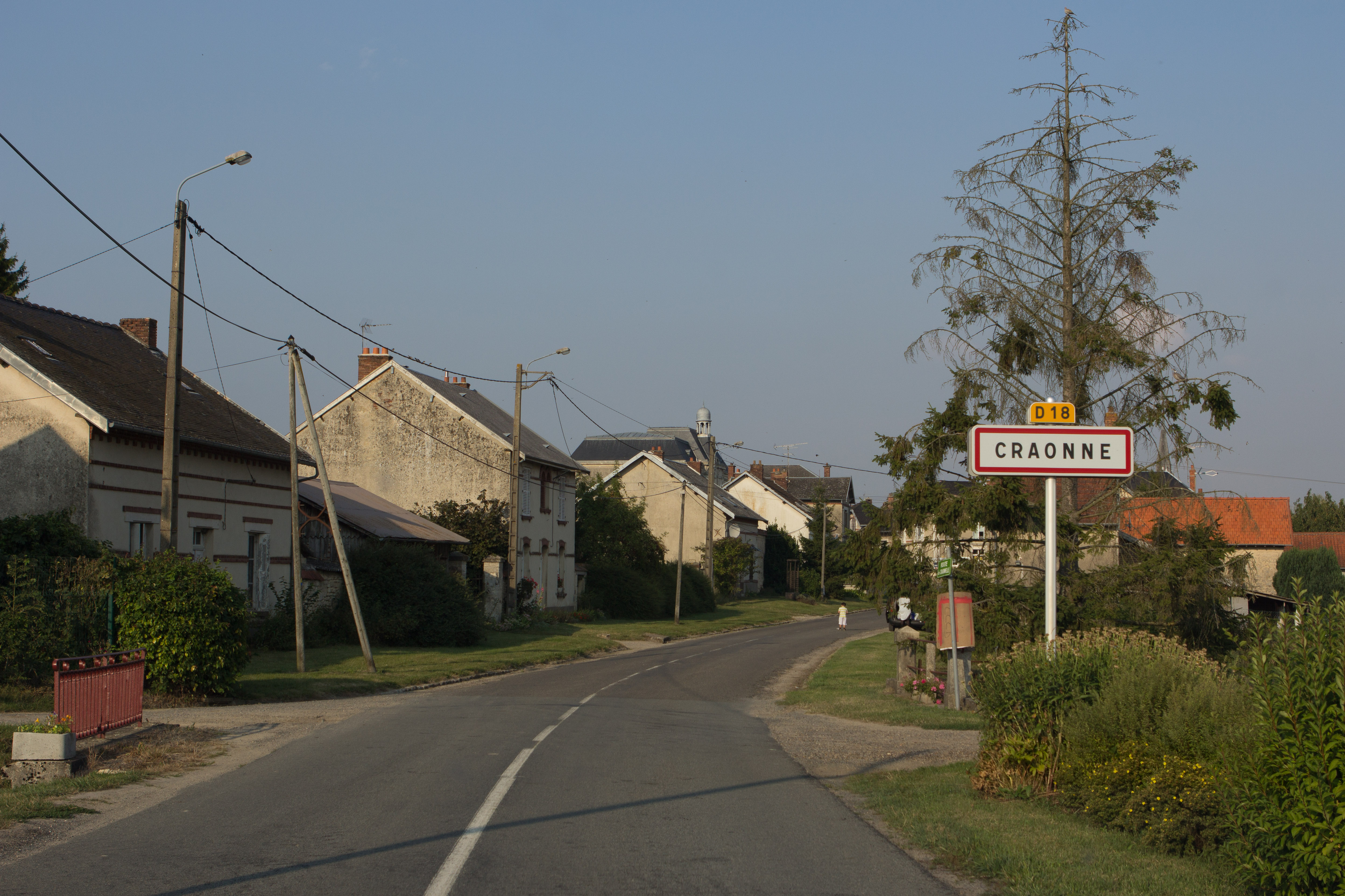 Entrée ouest de Craonne, RD18 en venant de Craonnelle / Craonne, Aisne, France